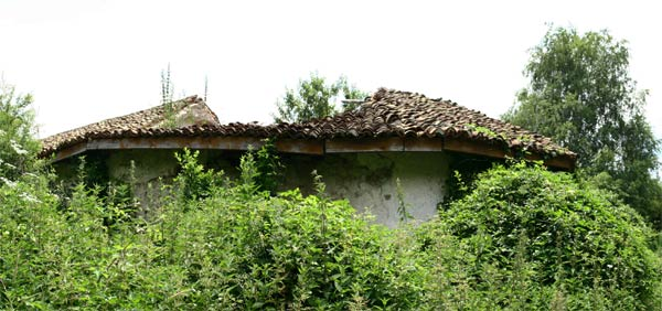 Църквата "Свети Николай" в с. Рани луг е средновековна църква, която датира от 17 век. За съжаление през последните години тя е в много лошо състояние - рушаща се, разграбена.